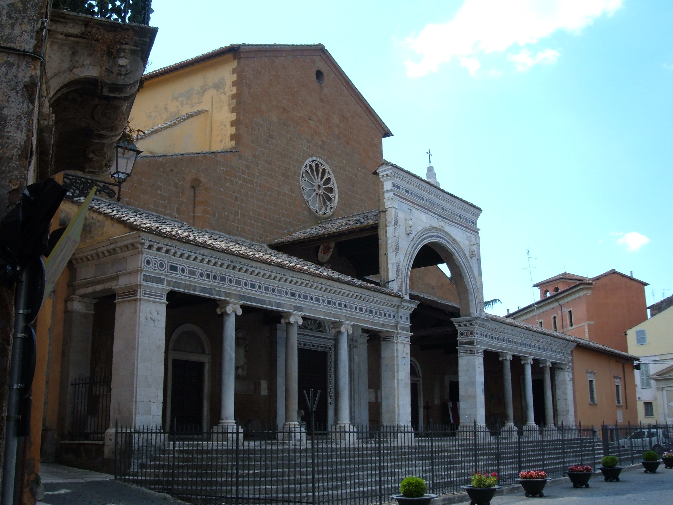 Duomo (Civita Castellana)